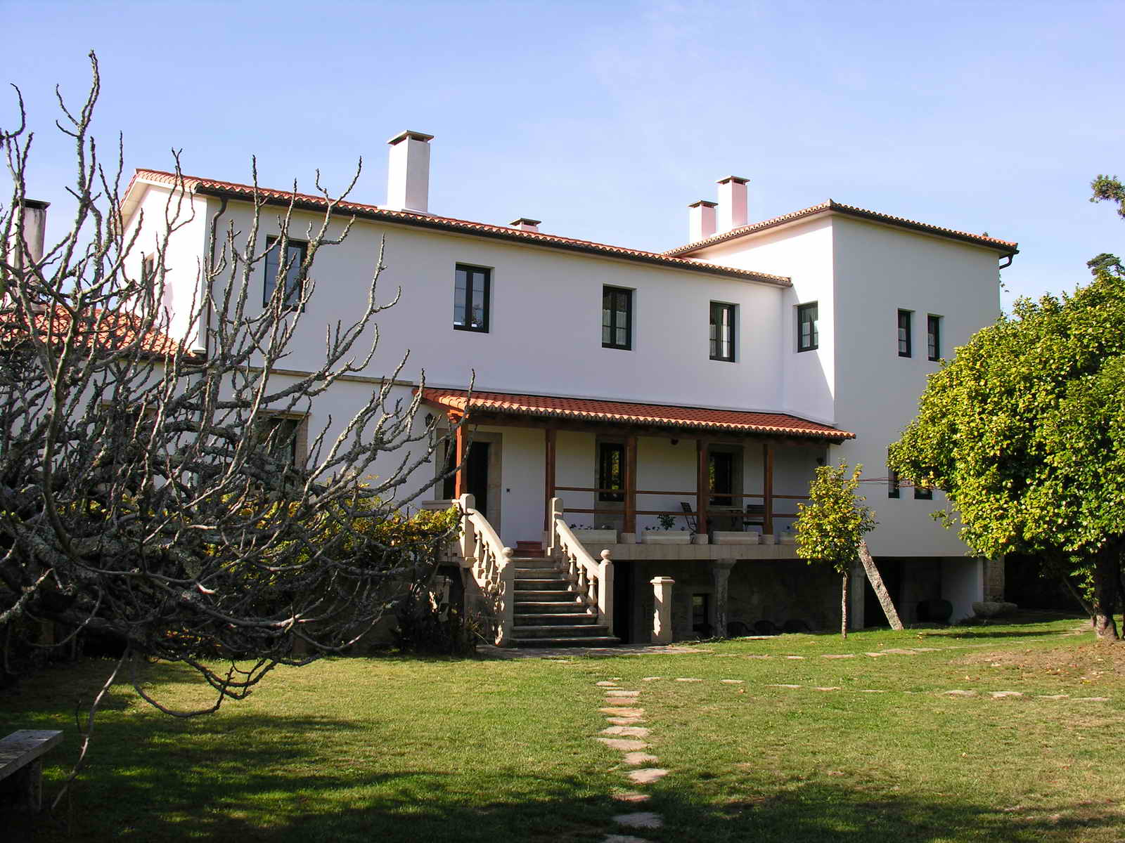 Teaño - Cuntis - Pontevedra - Spain